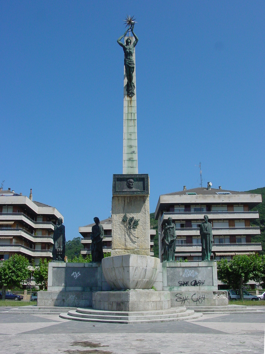 Monumento en Santoña (Cantabria, España) a Luis Carrero Blanco (1904-1973), quien fue vicepresidente (1963-1973) y luego presidente (1973) del gobierno de la Dictadura. Escultor: Juan de Ávalos. Inaugurado en 1996 siendo alcalde Maxi Valle (PSOE). Foto tomada en 2004.